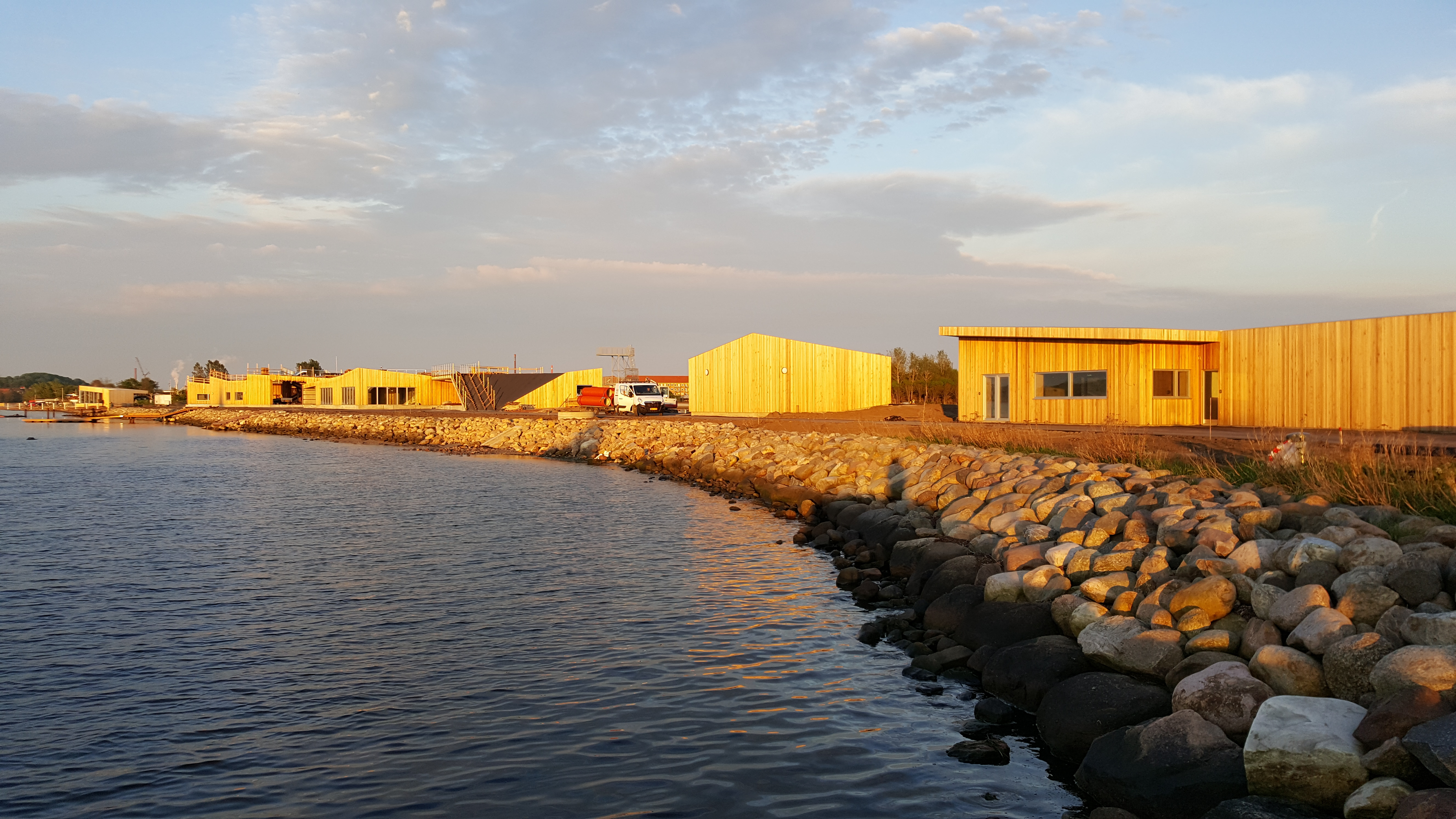 Vestre Fjordparks bygninger fra vandsiden